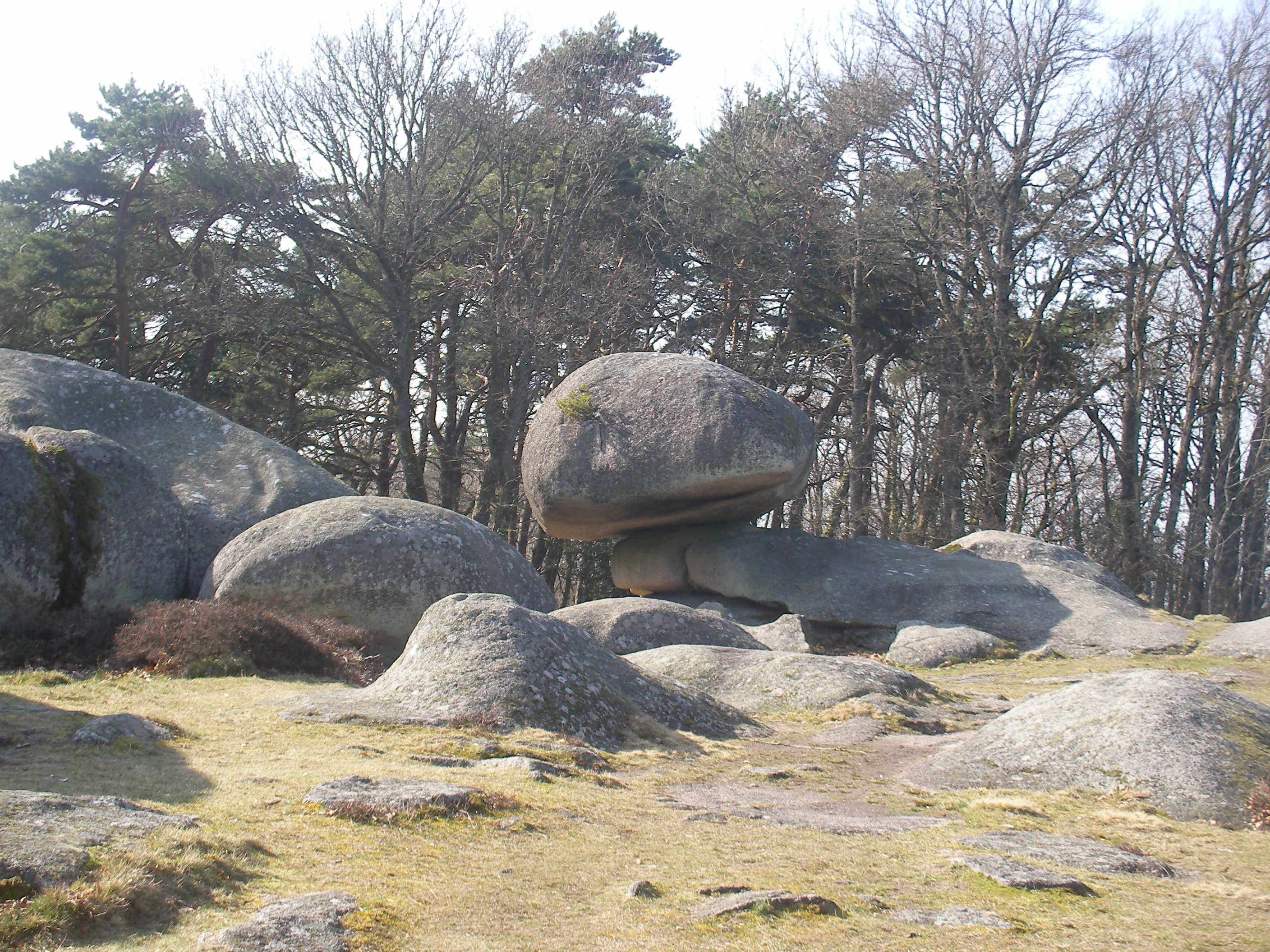 Le site des Pierres Jaumâtres est situé à trois kilomètres de Toulx-Sainte-Croix, en Creuse. Depuis des siècles, des blocs de pierre tiennent en équilibre. .